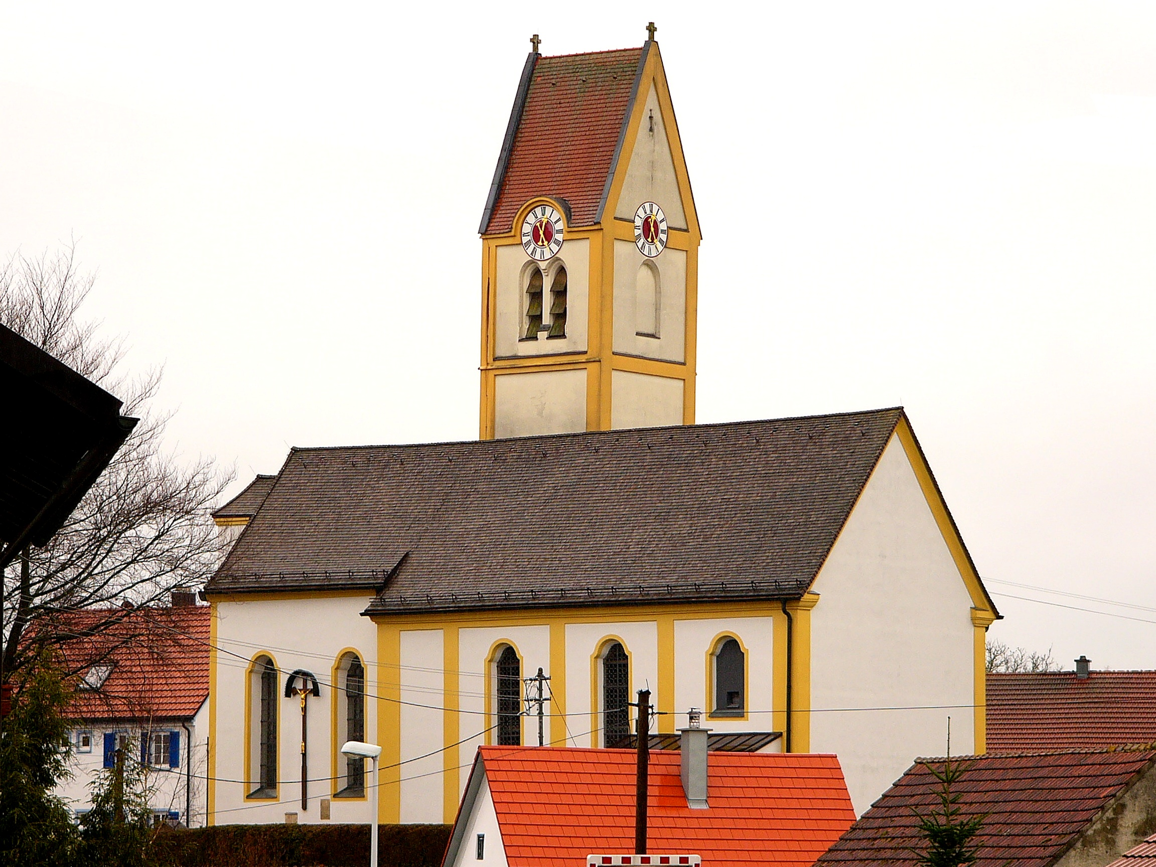 Katholische Pfarrkirche St. Valentin; lisenengegliederter Saalbau mit eingezogenem, dreiseitig geschlossenem Chor und Satteldachturm im südlichen Winkel, Chor und Turm im Kern spätgotisch, Langhaus 1715 nach Plänen von Dominikus Glasl; mit Ausstattung.This is a photograph of an architectural monument.